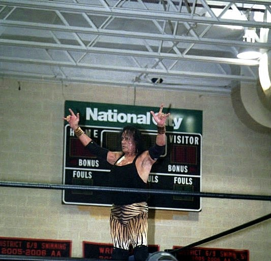 Wrestling legend Jimmy Snuka on 3/28/09 from Franklin PA